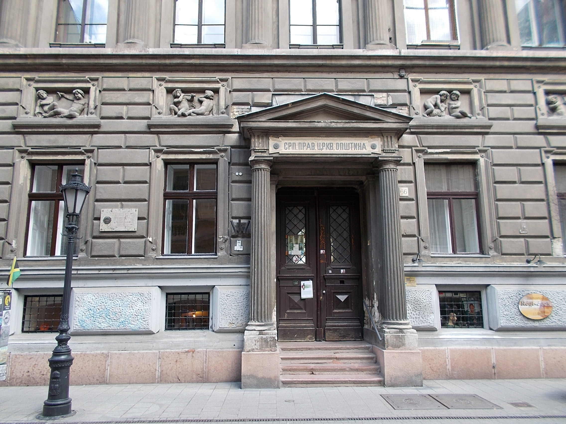 Háromemeletes, eklektikus műemlék ház, ID 647. Weber Antal, 1874. Ciril felirat szerb pravoszláv egyházközösség. - Budapest, 5. kerület. Váci utca 66